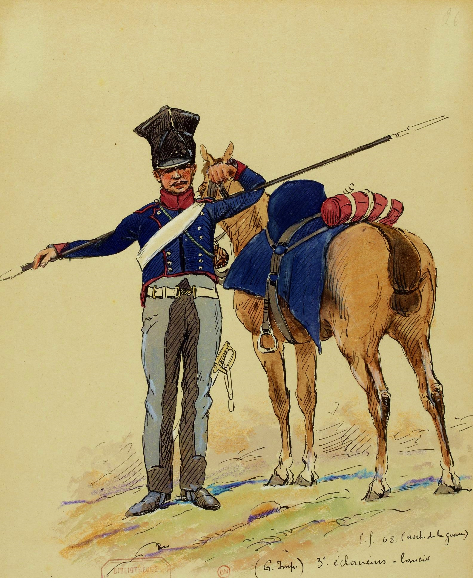 Éclaireur-lancier de la Garde impériale, 3e régiment, 1814. Tenue de campagne.